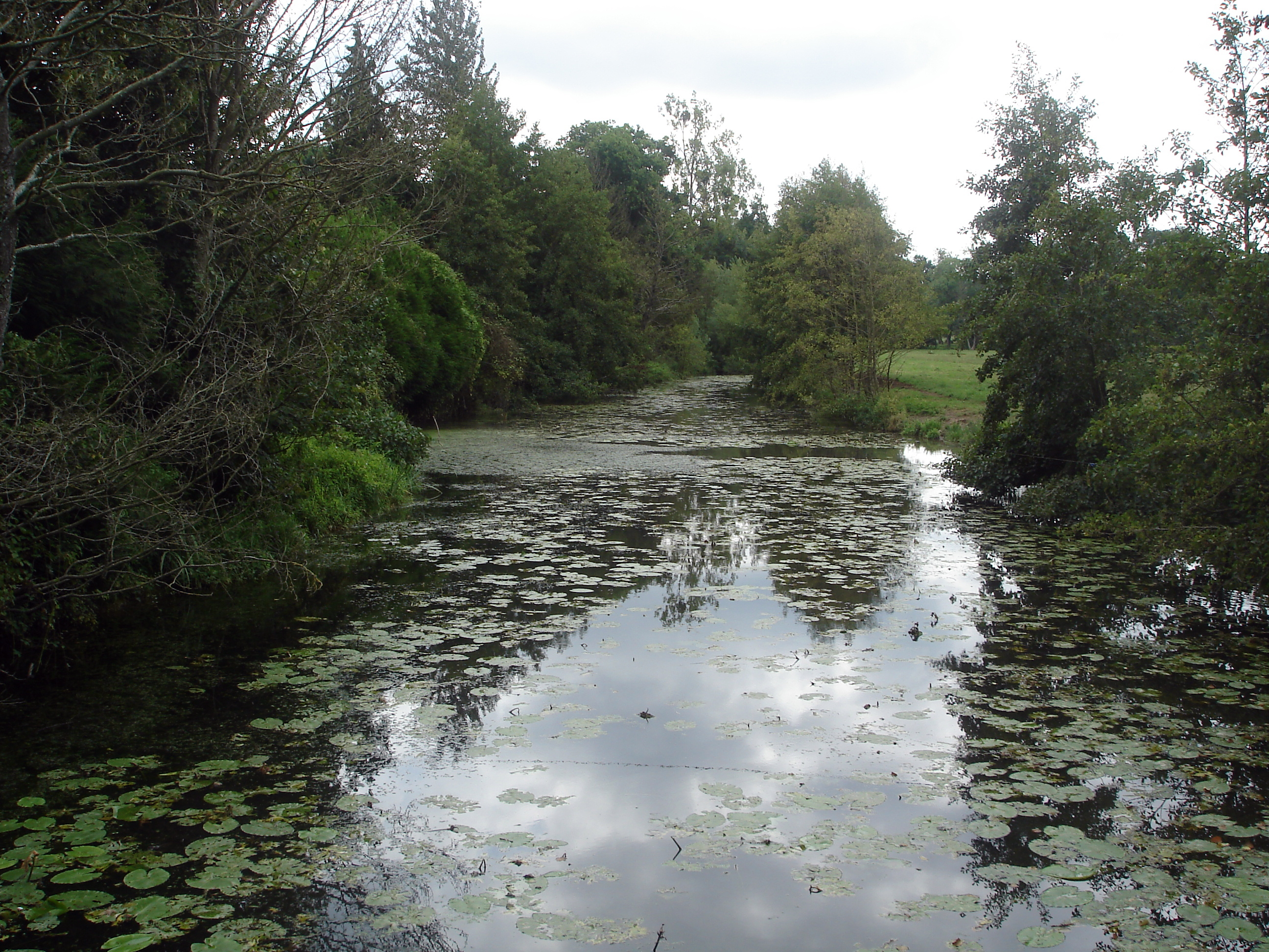 Rivière l'Ise au droit du village de Mesneuf, sur la commune de Bourgbarré (35)